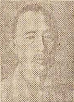 박중양, 한국의 관료, 정치인, 외교관, 철학자